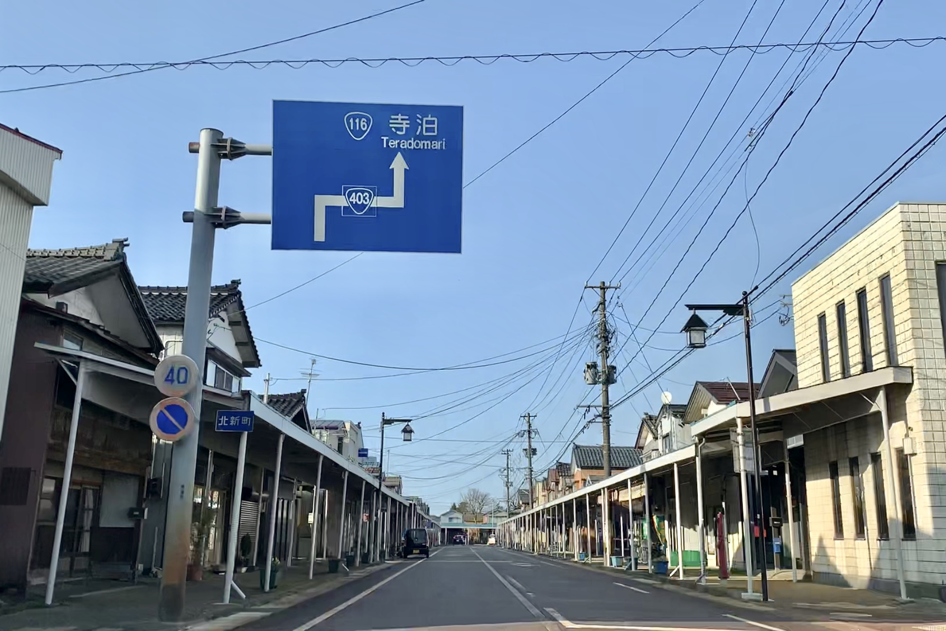 かぎ形道路が連続する与板市街地（新潟県長岡市，2020年3月）国道403号